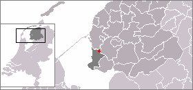 Kaart met de locatie van Nijhuizum, gemaakt uit sjabloon van Wikipedia-gebruiker Mtcv